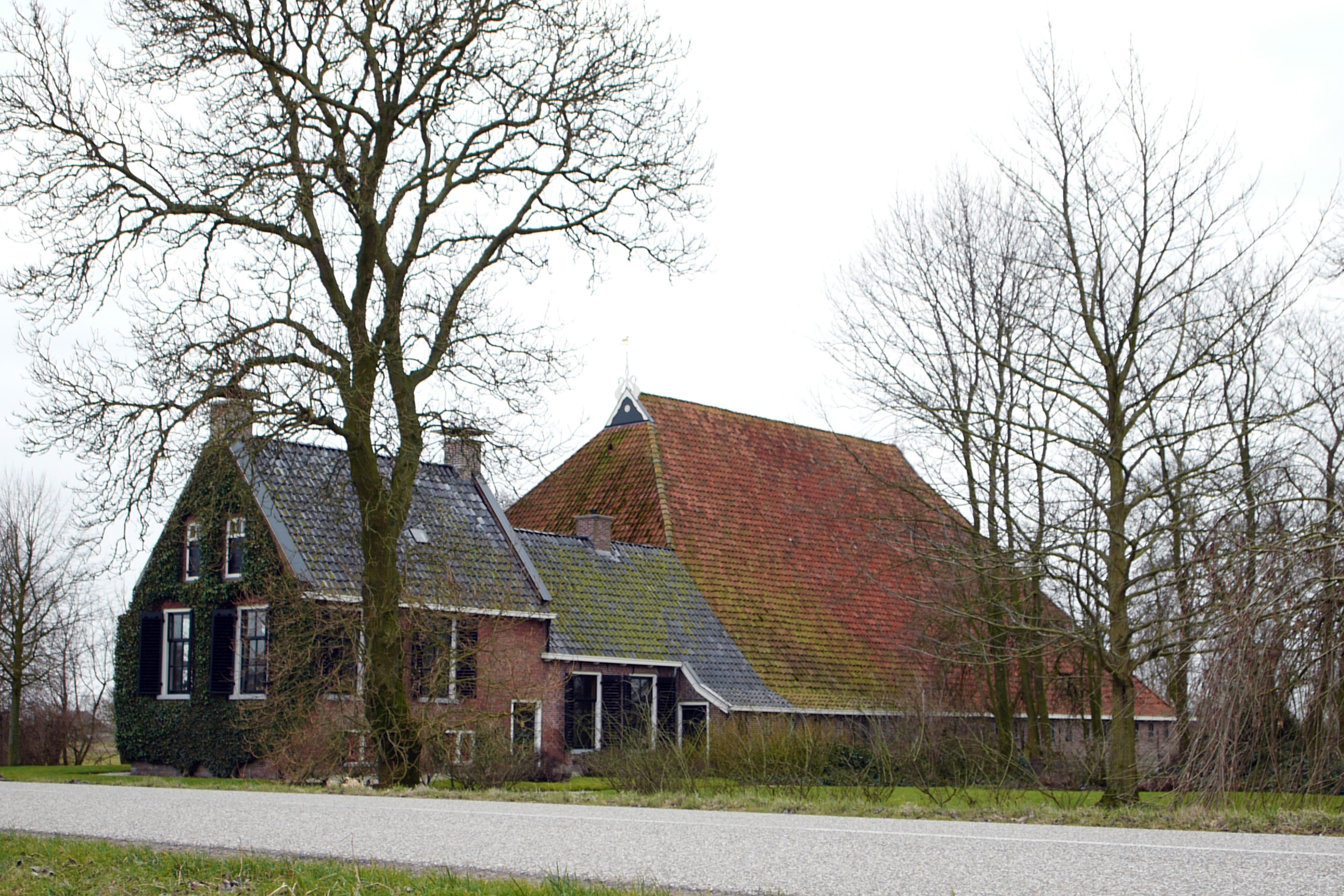 Een kop-hals-romp boerderij